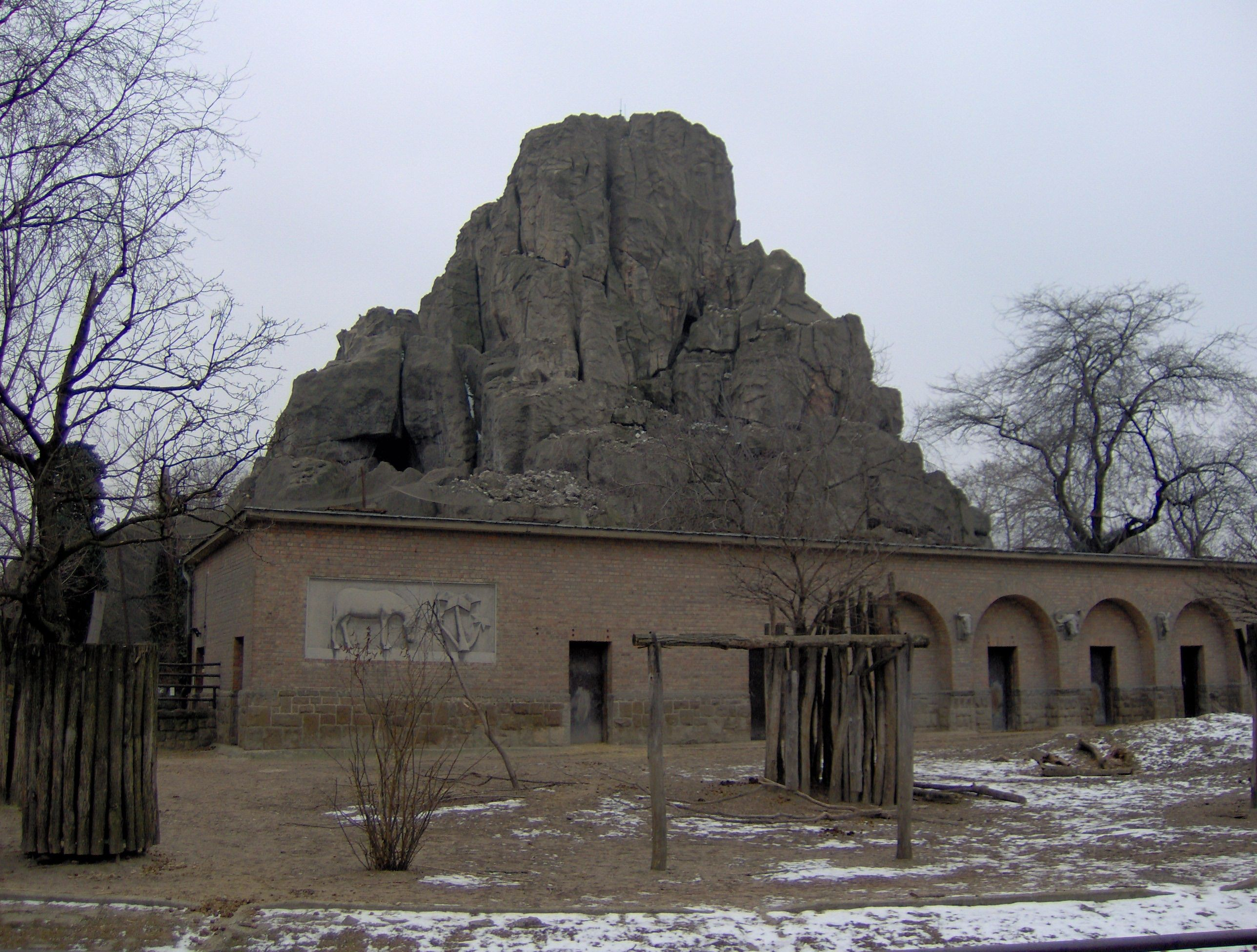 Budapesti állatkert, a Nagyszikla és az Afrika kifutó